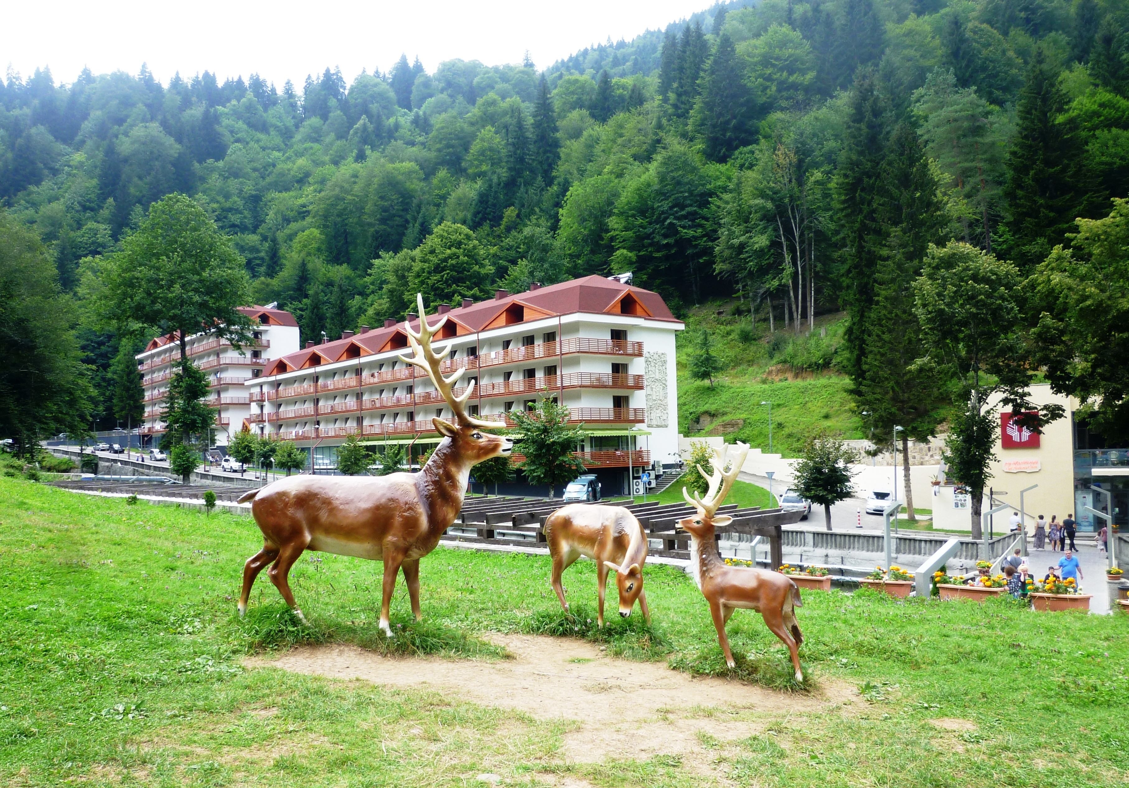 საირმე, ირმების ქანდაკება